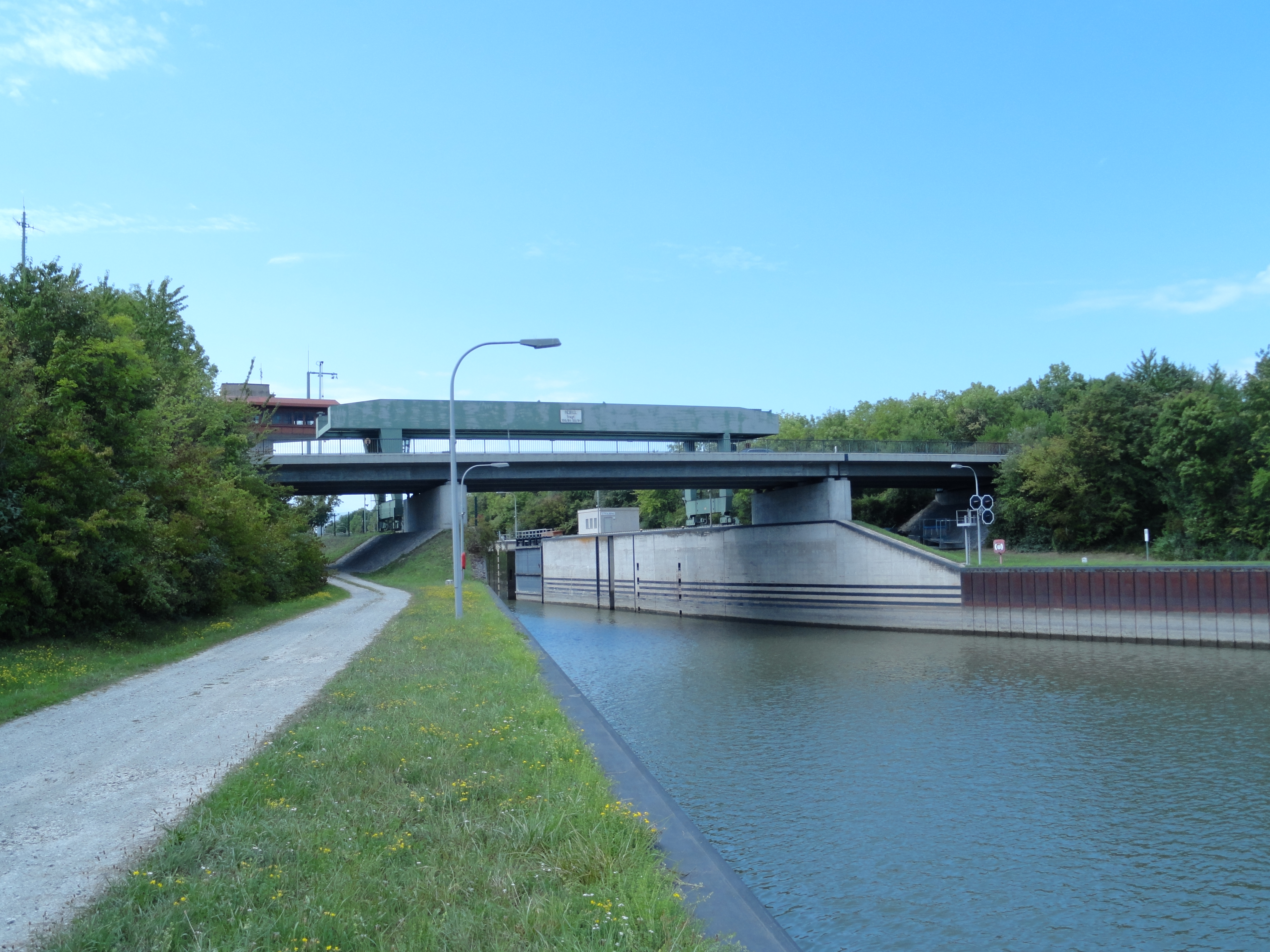 Blick in die offene Schleuse Straubing vom Unterhaupt; Kagerser Brücke (UH Schleuse)